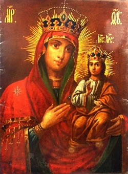 Икона Божия Матерь Тупичевская